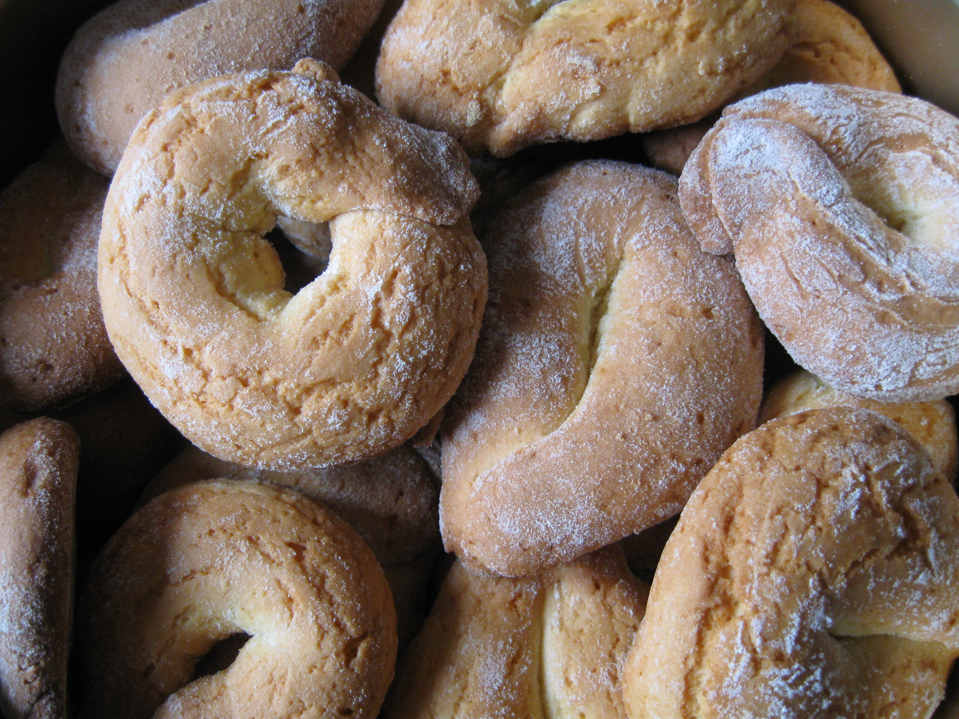 Buslanein, tipiche ciambelline piacentine